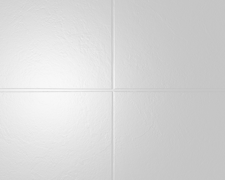 Bump mapa na rovině.